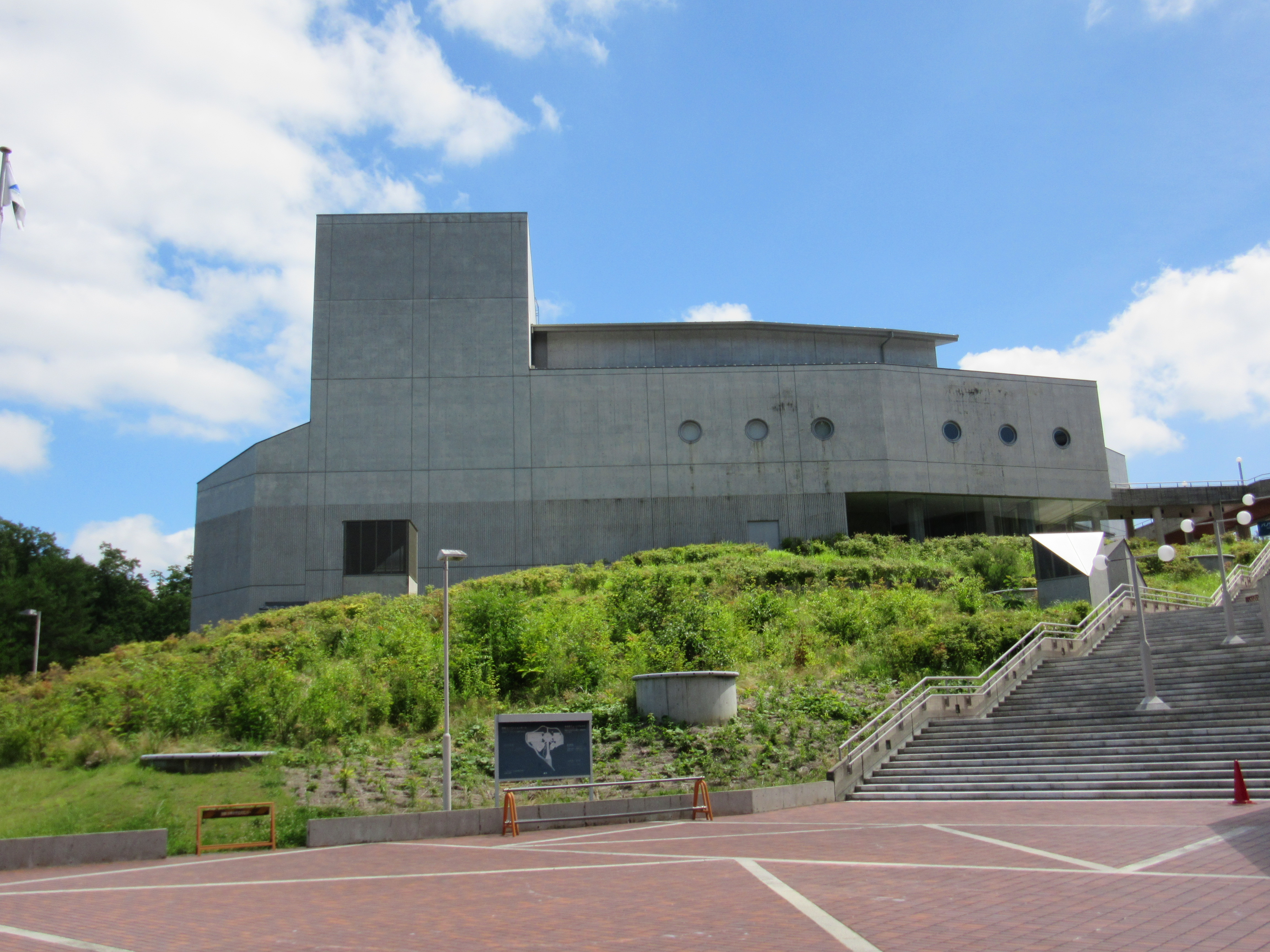 飛騨・世界生活文化センター